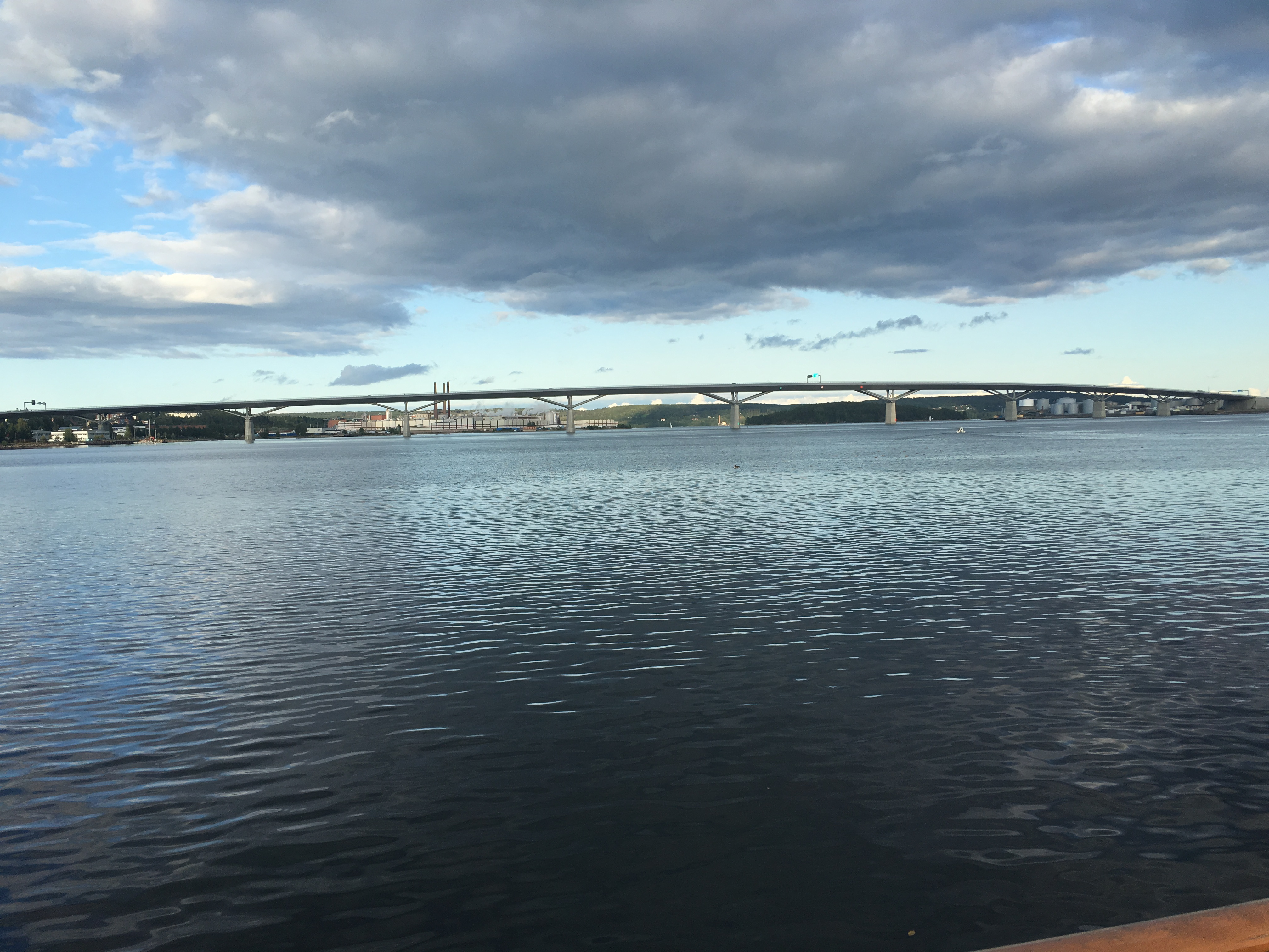 Sundsvallsbron från väster.